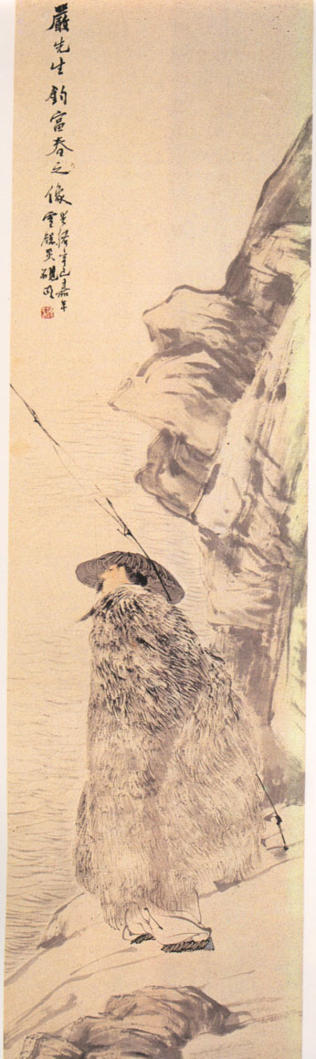 [清] 任伯年绘 严子陵像 来自 此图为二维平面艺术（古画），无特殊版权。